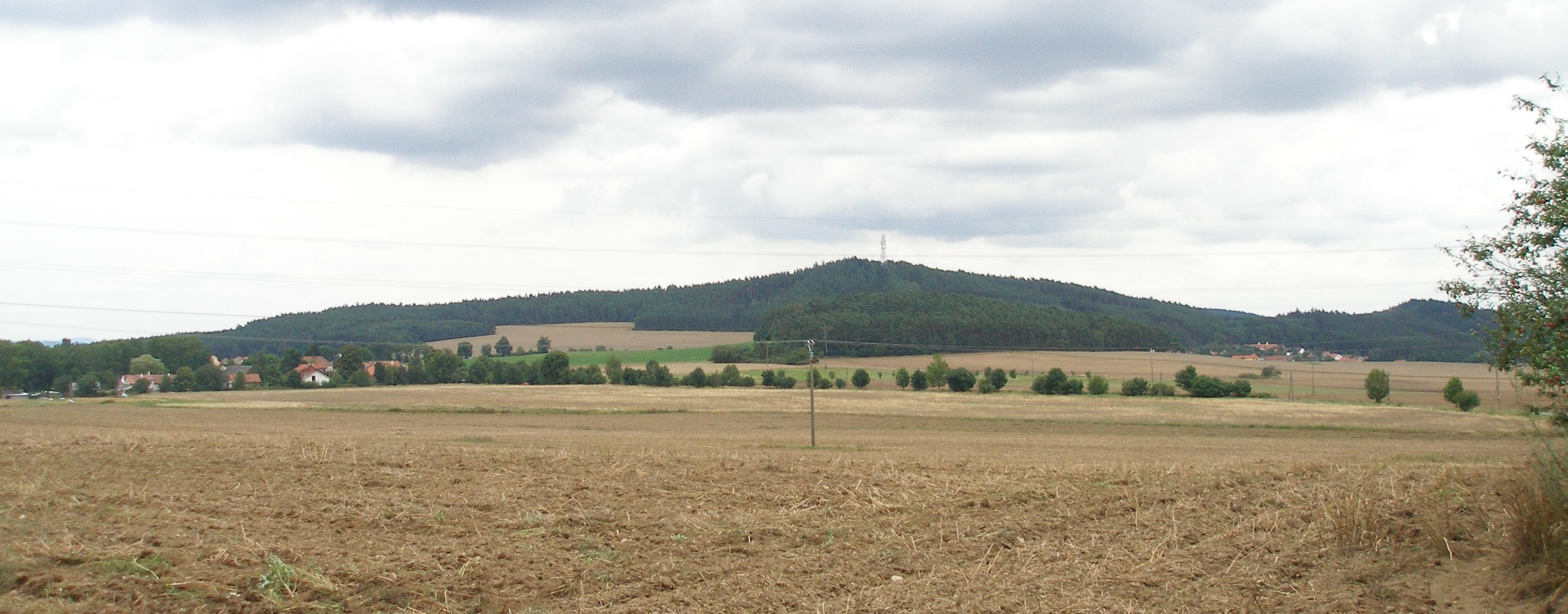 Veselý vrch, vlevo Prostřední Lhota, vpravo Mokrsko